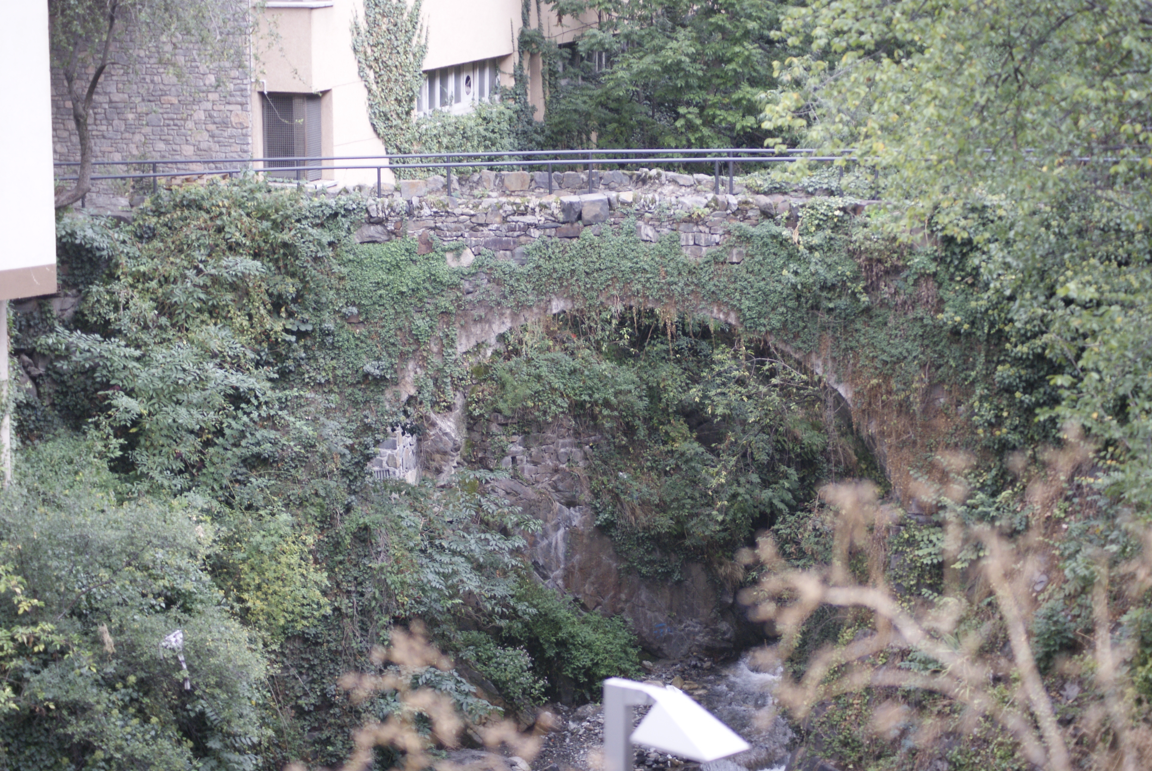 Pont dels Escalls (Escaldes-Engordany)